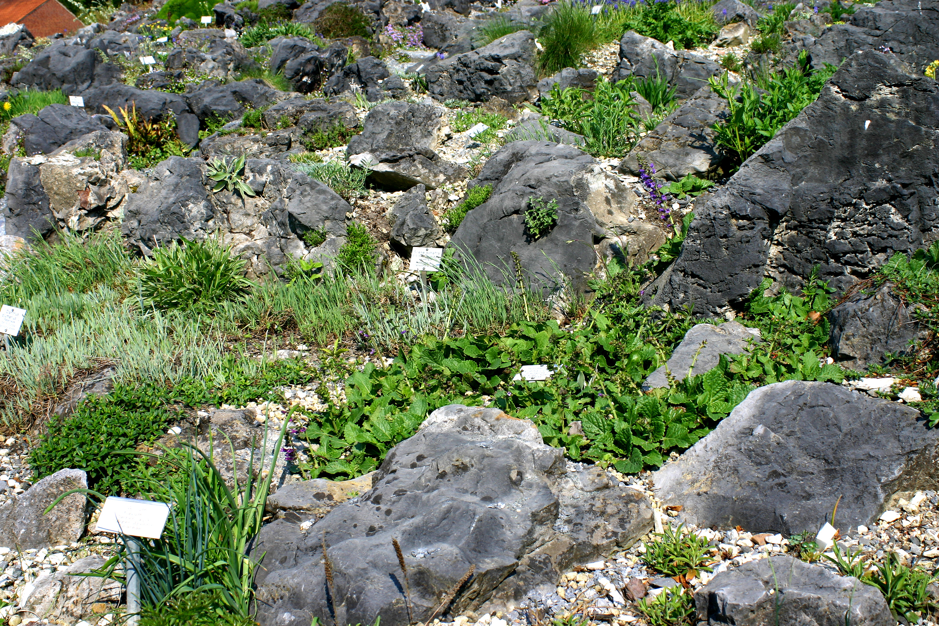 Alpinarium im Botanischen Garten der WWU-Münster